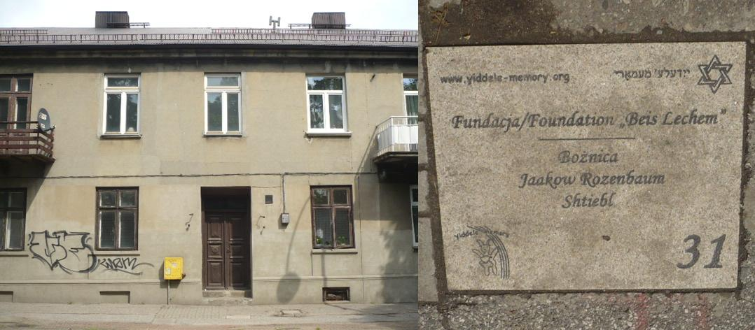 Radomsko. Otwarte Muzeum Żydowskie 31